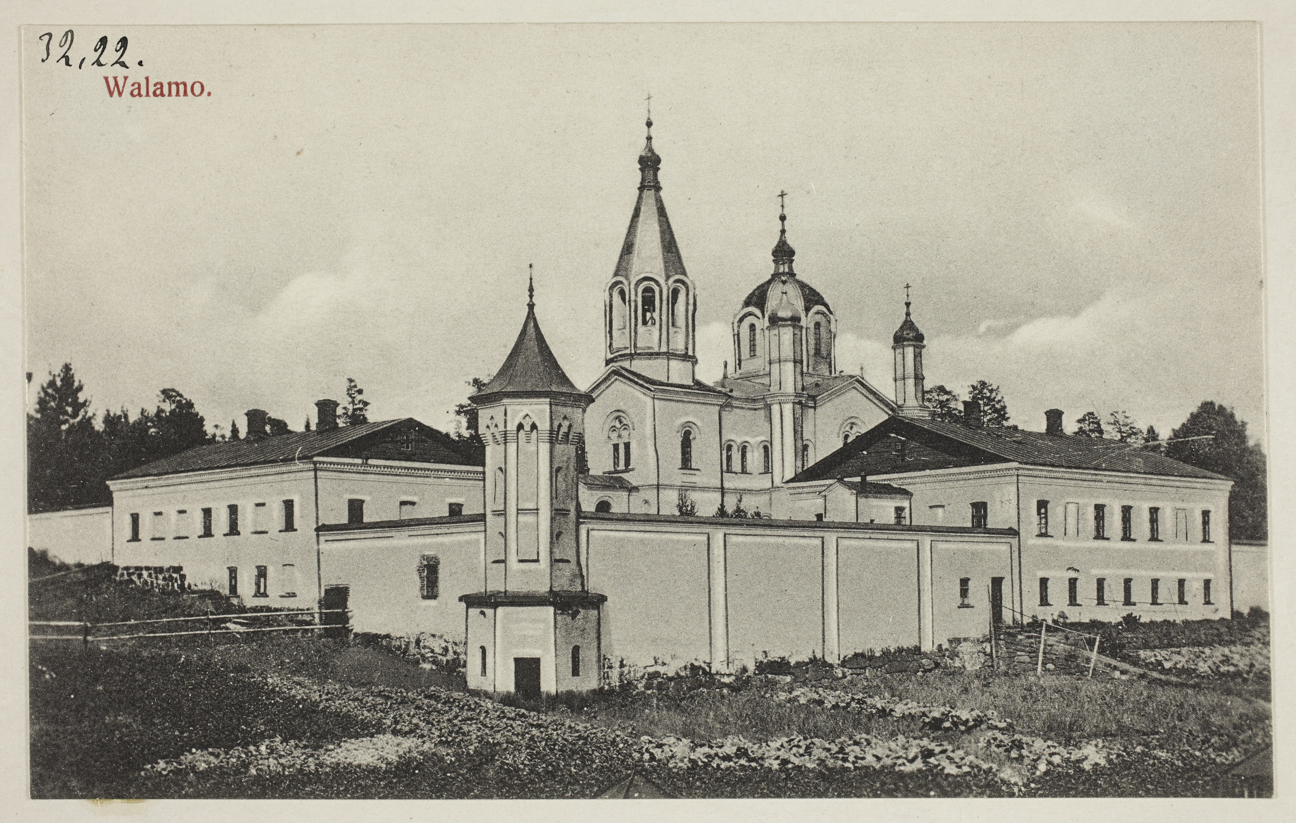 Kaikkien pyhien skiitta (eli Suuri eli Iso skiitta). Erakkosaari, Sortavalan mlk., Valamo